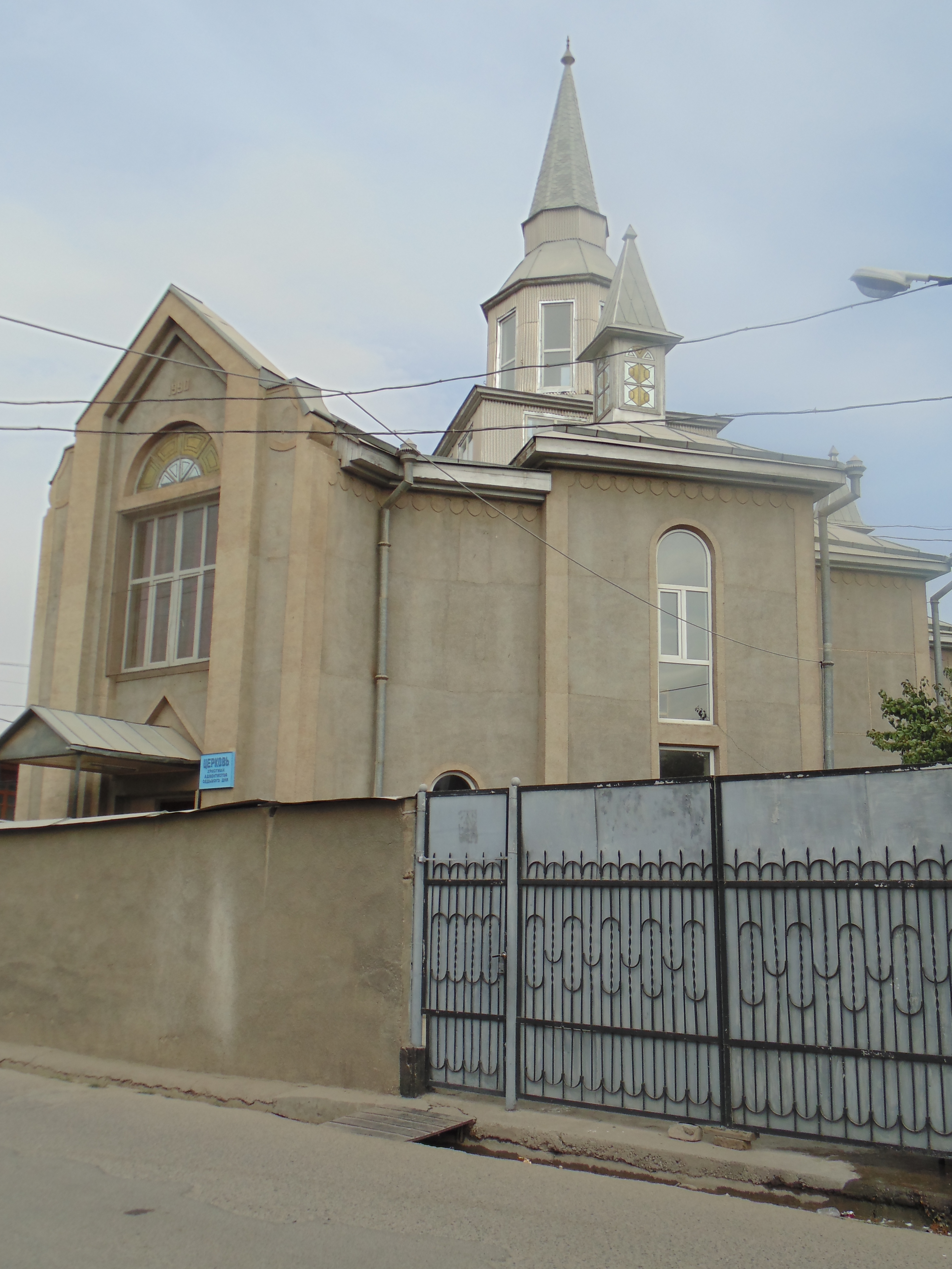 Духовный центр адвентистов седьмого дня (немецкая Кирха, Душанбе)